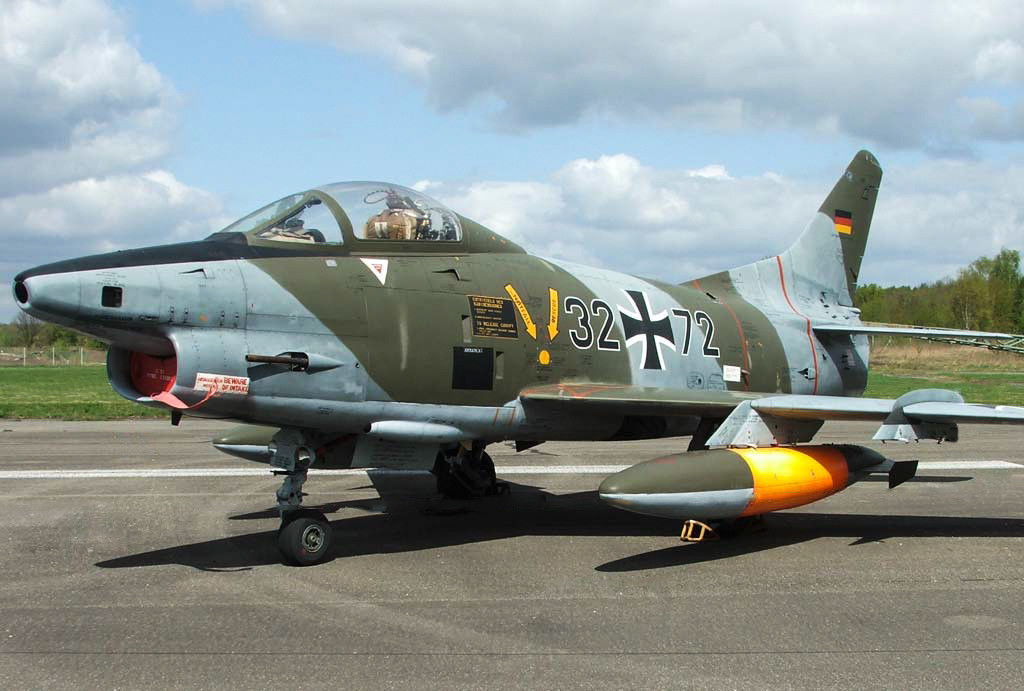 Fiat G.91 - Luftwaffe Museum - Gatow